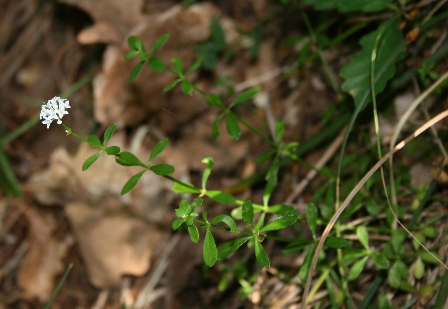 Asperula involucrata, Kaffeegewächse (Rubiaceae) - Türkei/Türkiye/Turkey: Düzce Prov./Düzce ili, NW Kalkın W Akçakoca, Eichen-Mischwald